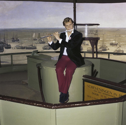 De Finse zanger Vesa-Matti Loiri tijdens een fotosessie voor het Eurovisie Songfestival 1980